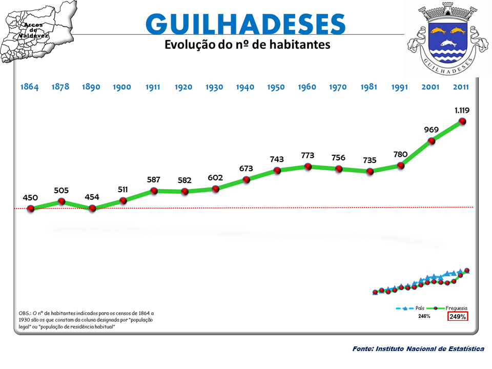 Censos 1864/2011